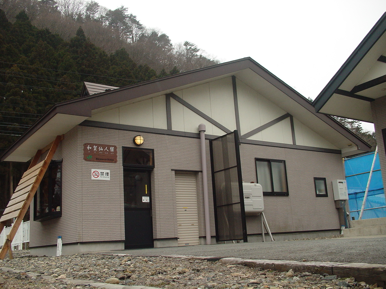 （和賀仙人駅）